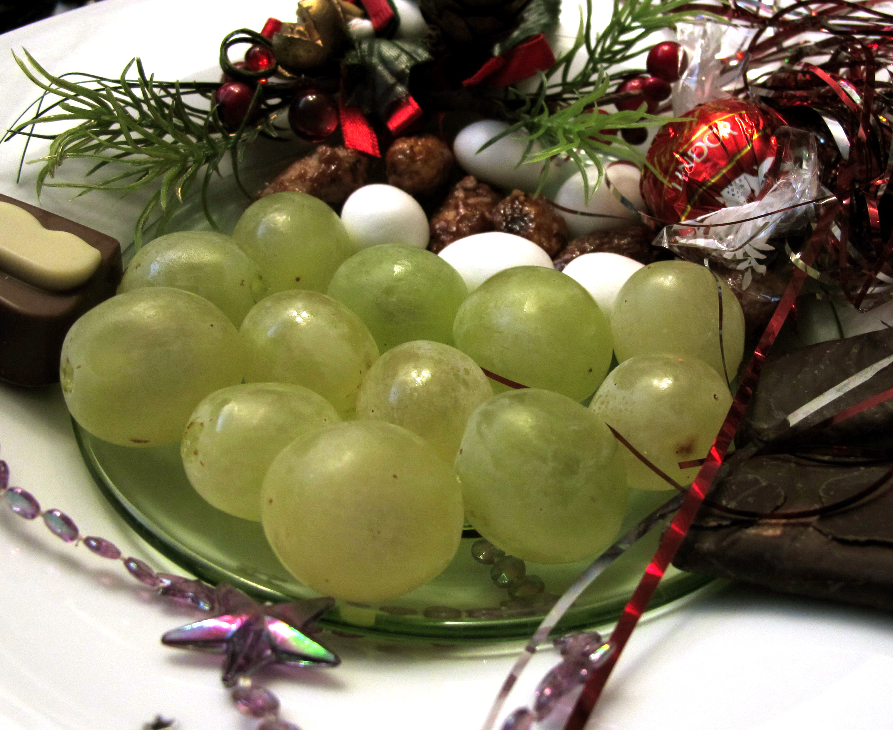 Uvas de la suerte.